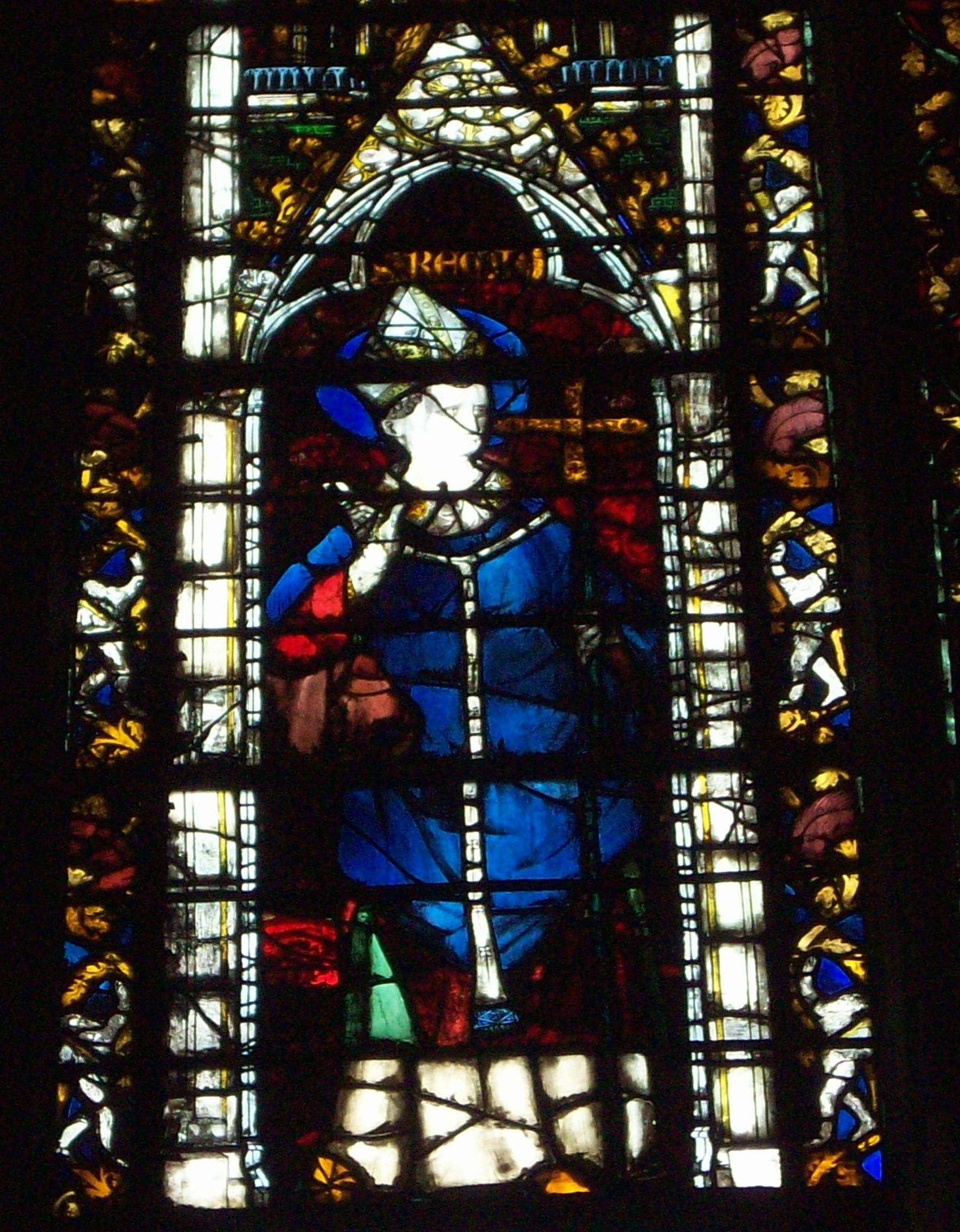 Vitrage de Remi de Rouen.